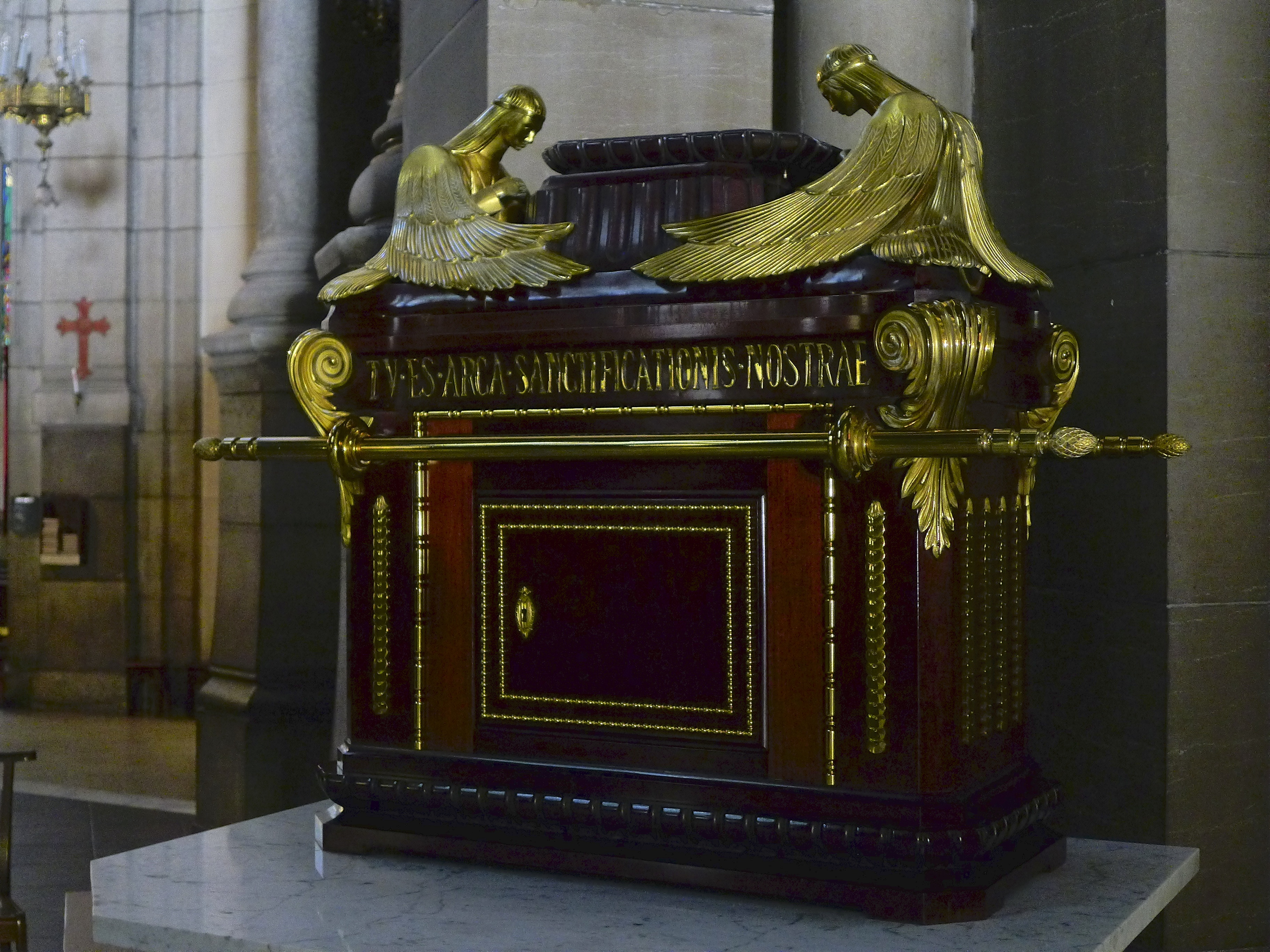 Vue latérale de la représentation de l'arche d'alliance présente au sein de la Cathédrale Saint-Charles Borromée à Saint-Etienne. On distingue sur le cliché 2 chérubins allongeant leurs ailes ainsi que l'inscription "Tu es arca sanctificationis nostrae".